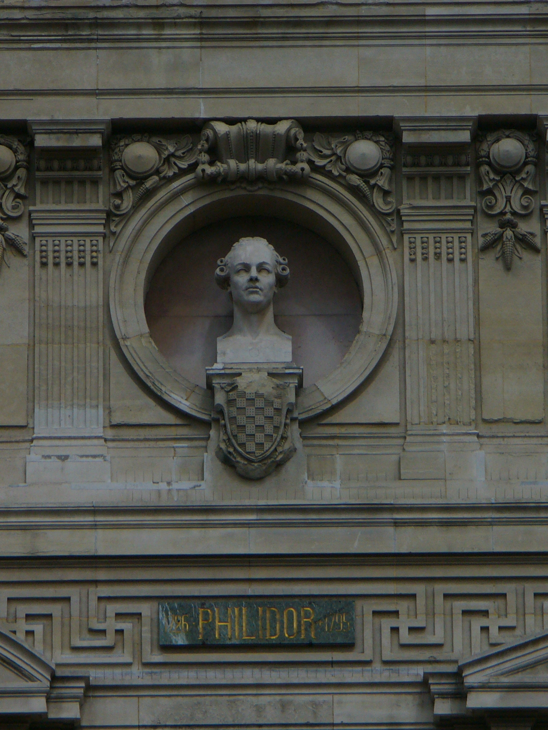 Buste de Philidor au palais Garnier à Paris